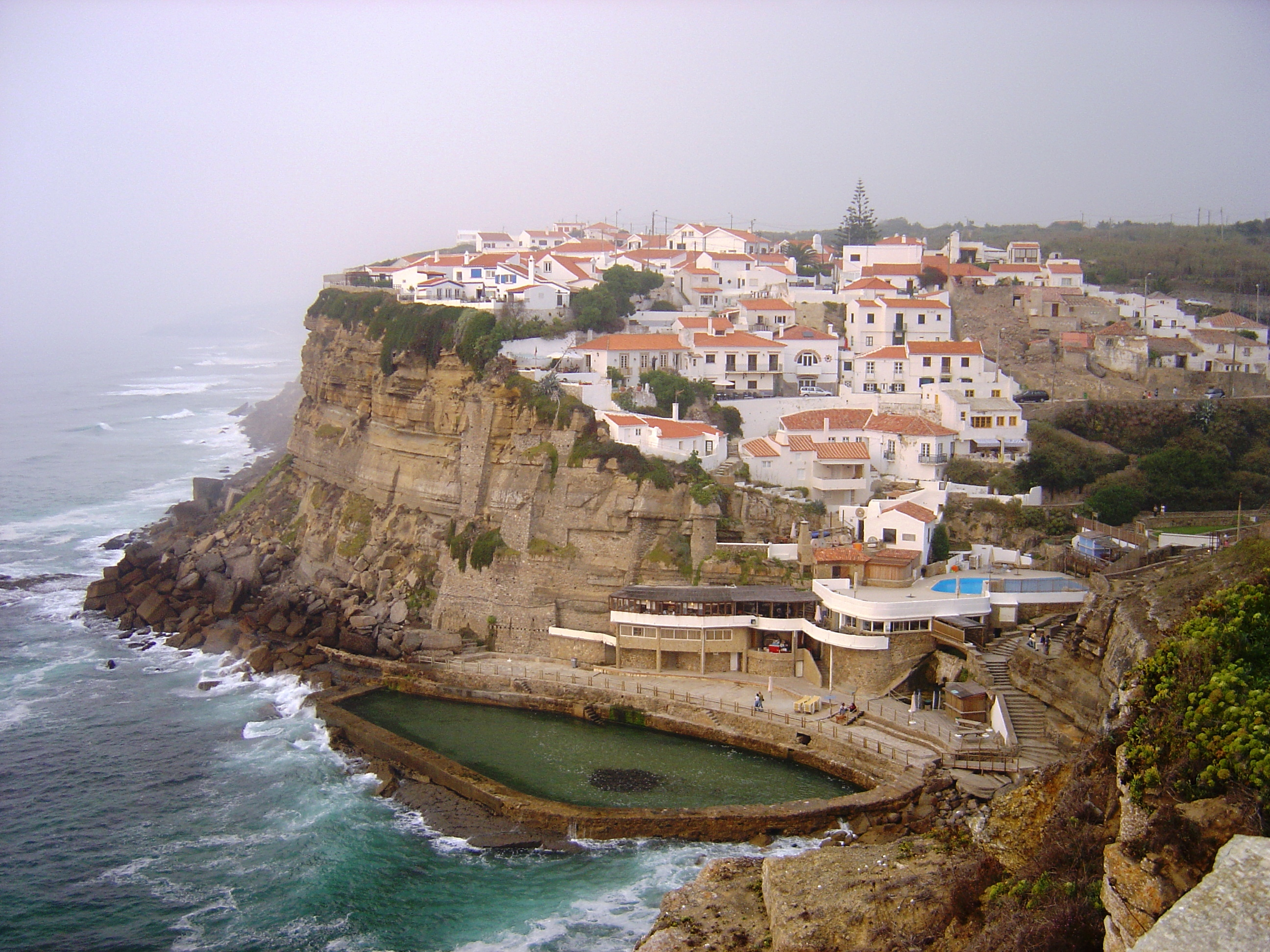 Azenhas do Mar, Portugal